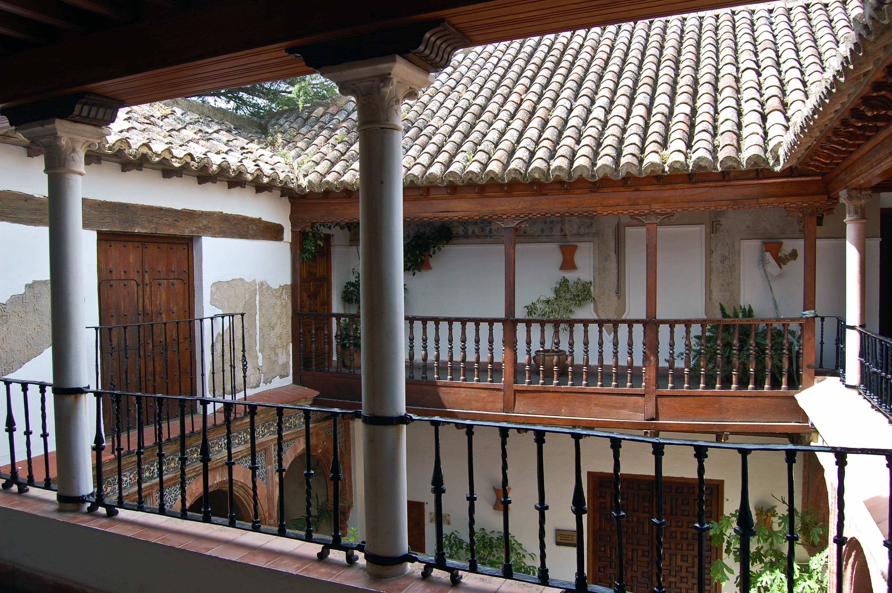 Ronda